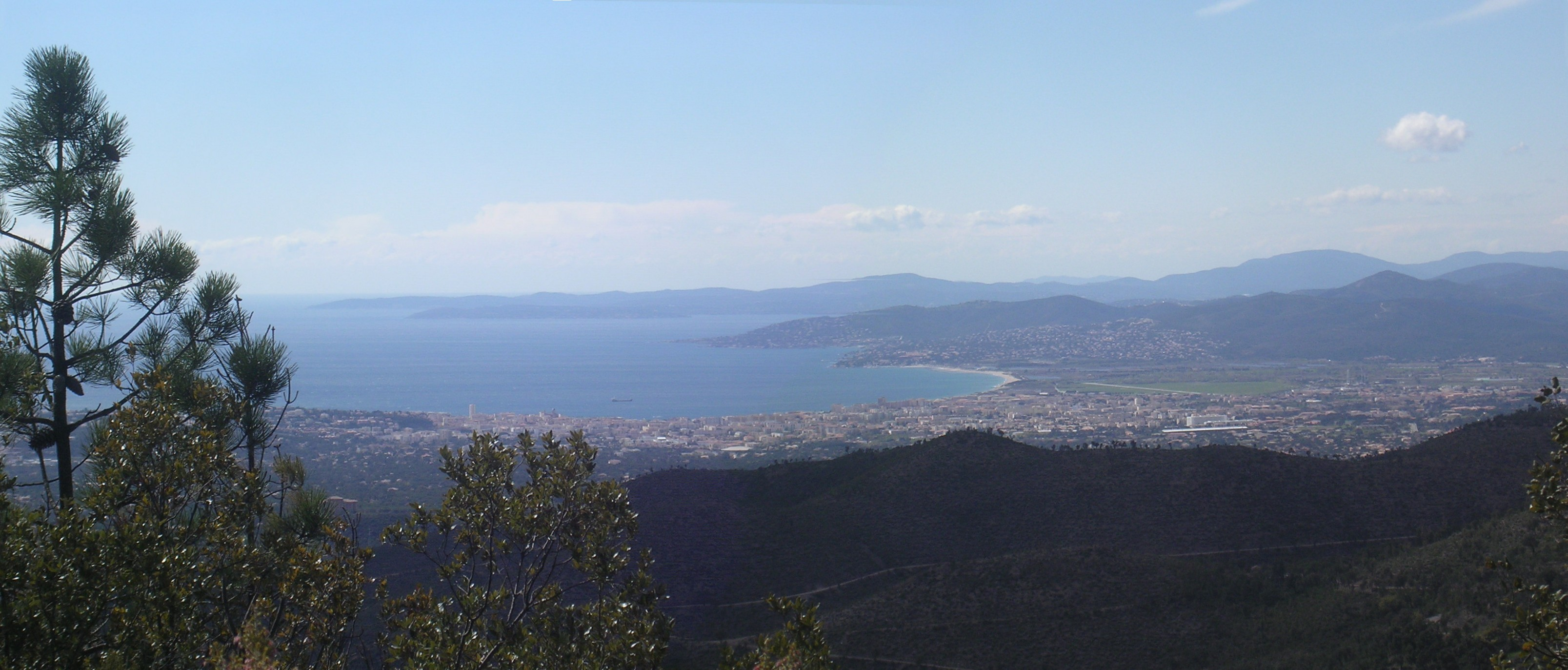 Baie de Fréjus St Raphaël, (Var - France)